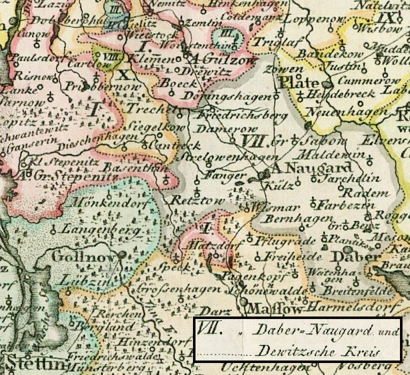 Ausschnitt aus "Landkarte des Herzogtums Vor- und Hinterpommern aus dem Jahr 1794"